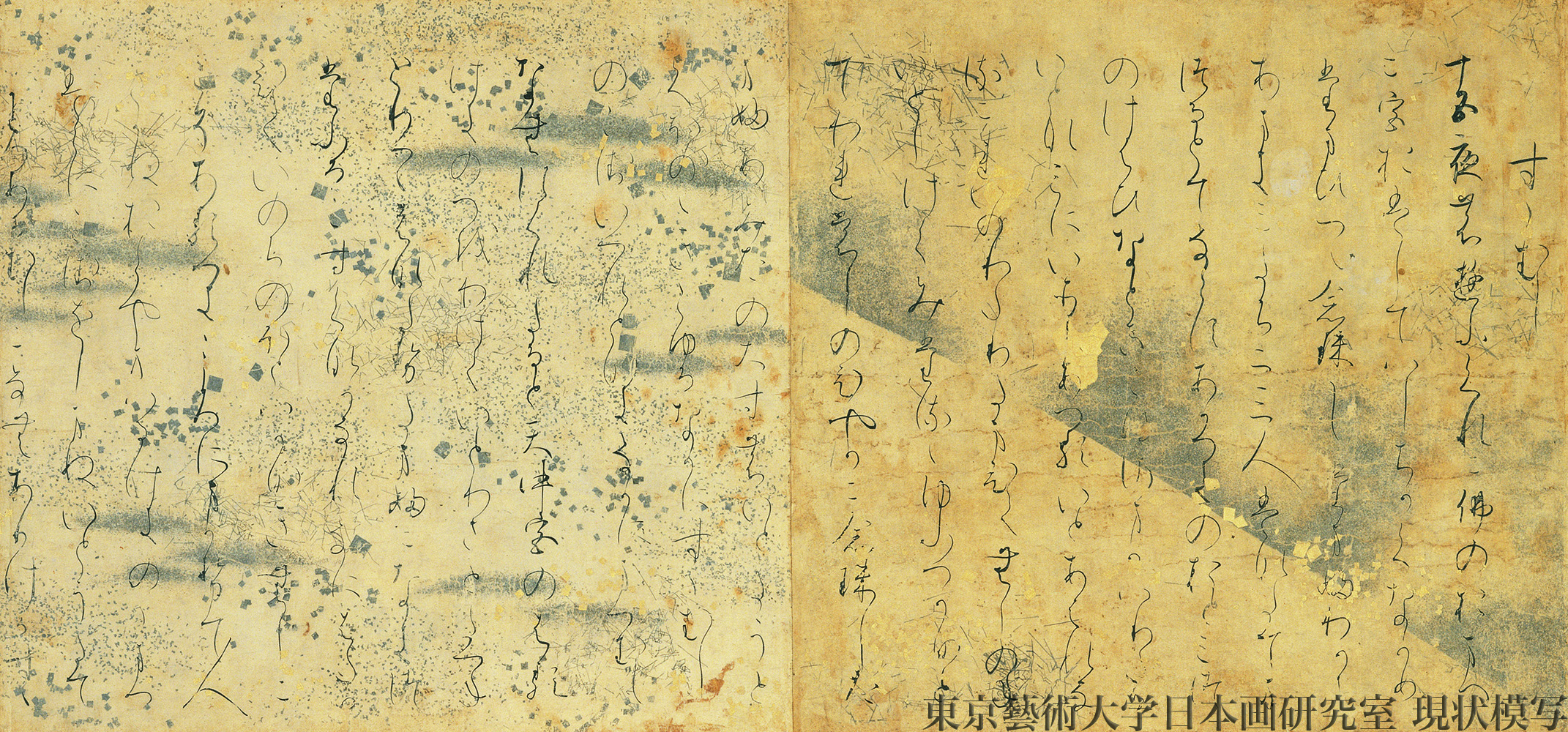 紙本墨色／一面 平安時代後期・12世紀 縦21.8cm 横46.7cm 五島美術館蔵